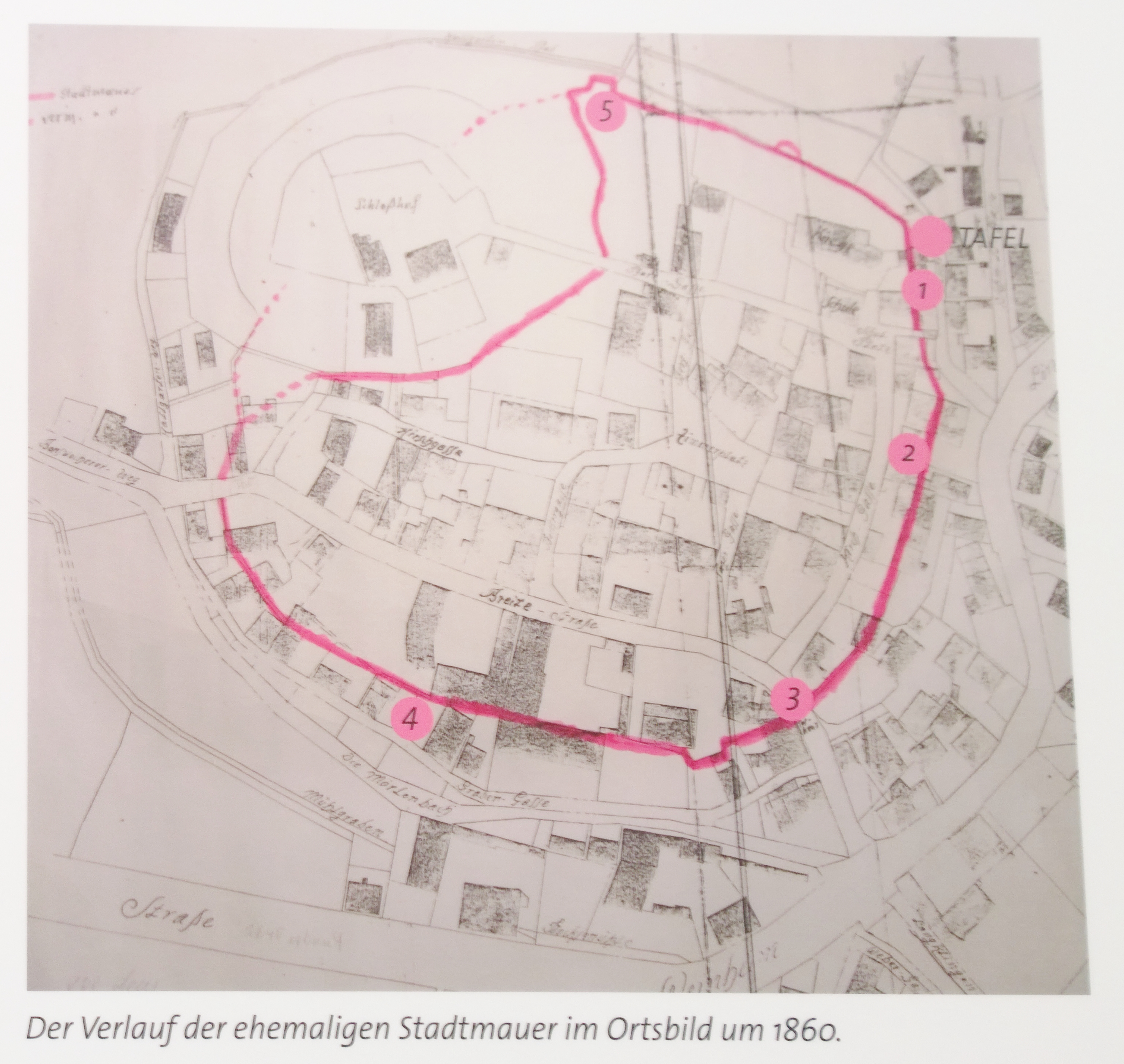 Stadtskizze von 1860 über den Ort Mörlenbach und mit Lage des "Schlosshofes", Standort der ehemaligen Wasserburg. Rot ist der Verlauf der ehmaligen Stadtmauer eingezeichnet. Reste finden sich am Rathausplatz (1), (2)